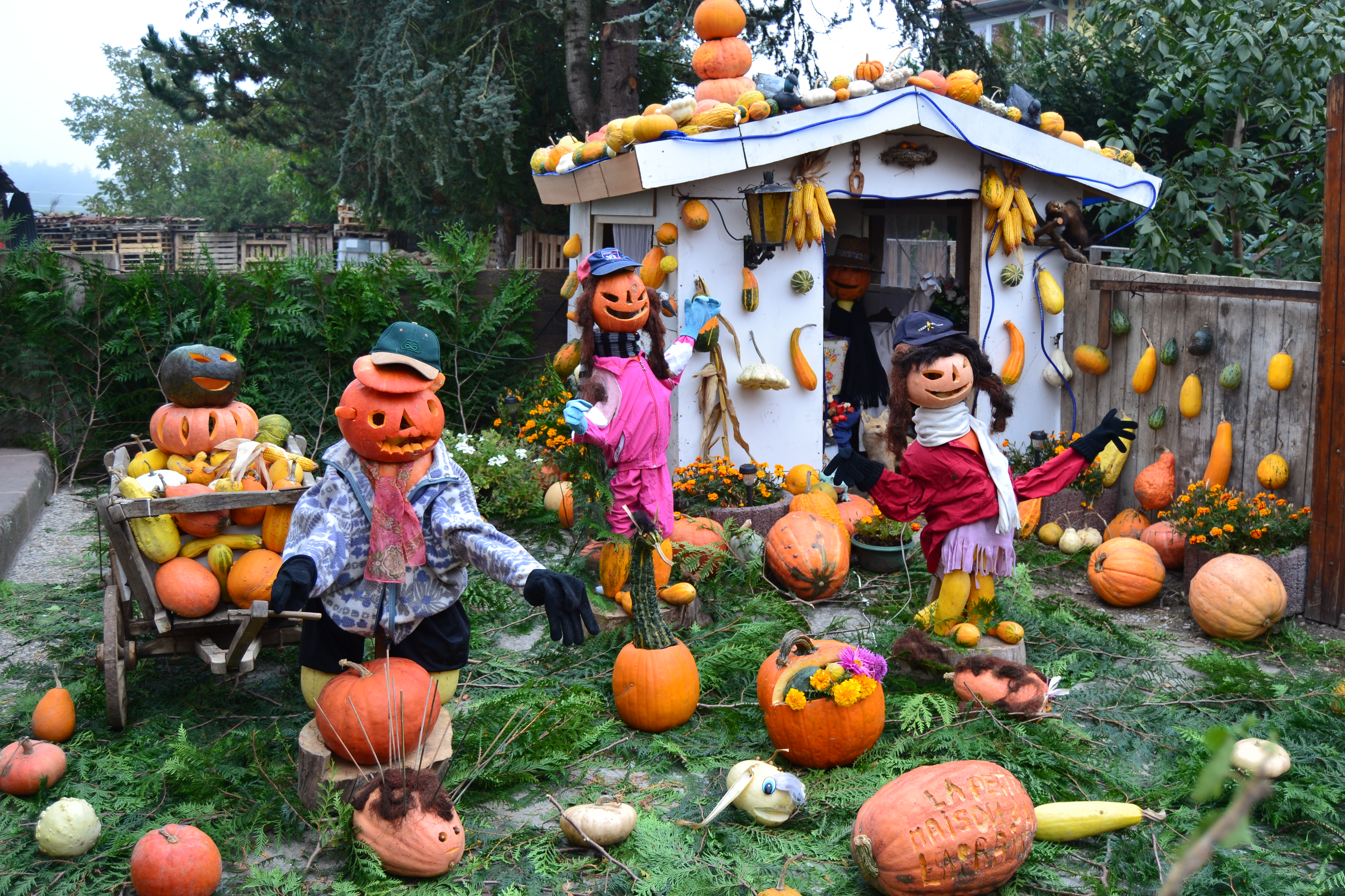 Logelheim, Alsace, France, 15ème fête du potiron.